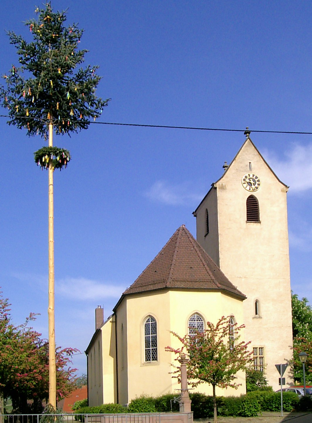 Kirche im Müllheimer Ortsteil Feldberg, Baden-Württemberg, Deutschland